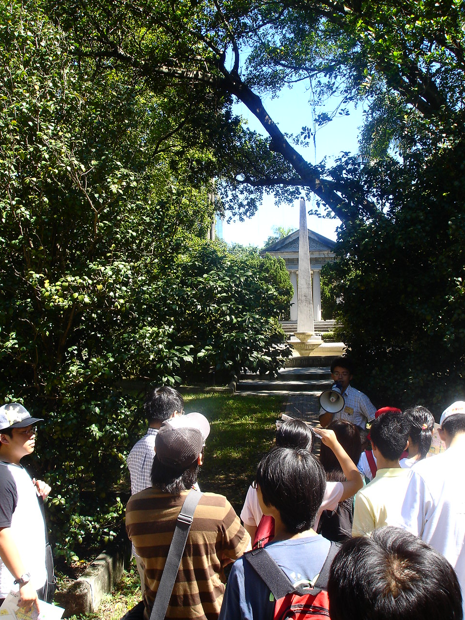 臺灣大學校園導覽解說社介紹傅園。